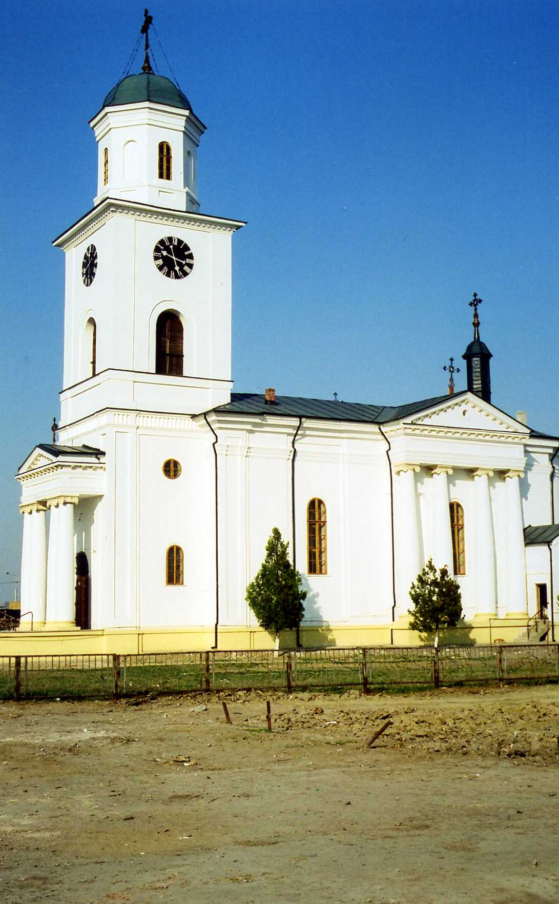 Biserica "Sf. Ilie" a breslei blănarilor